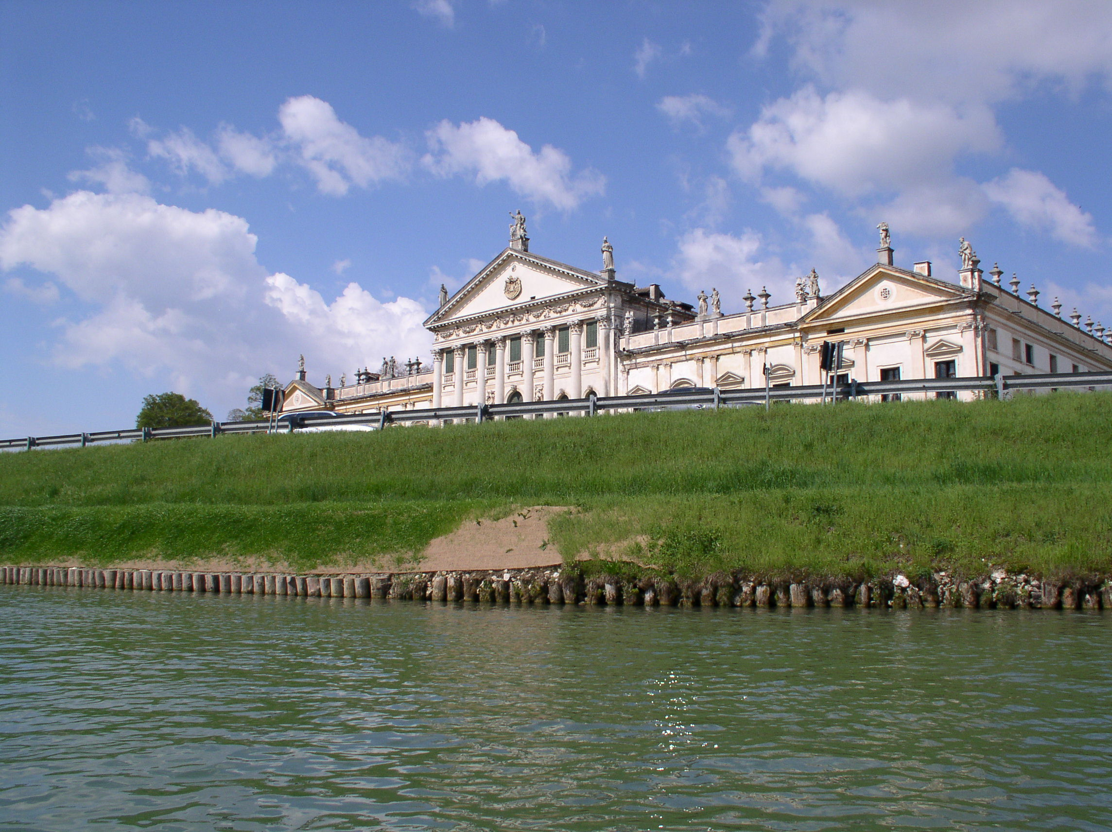 discesa in kayak del Canale del Brenta a Stra